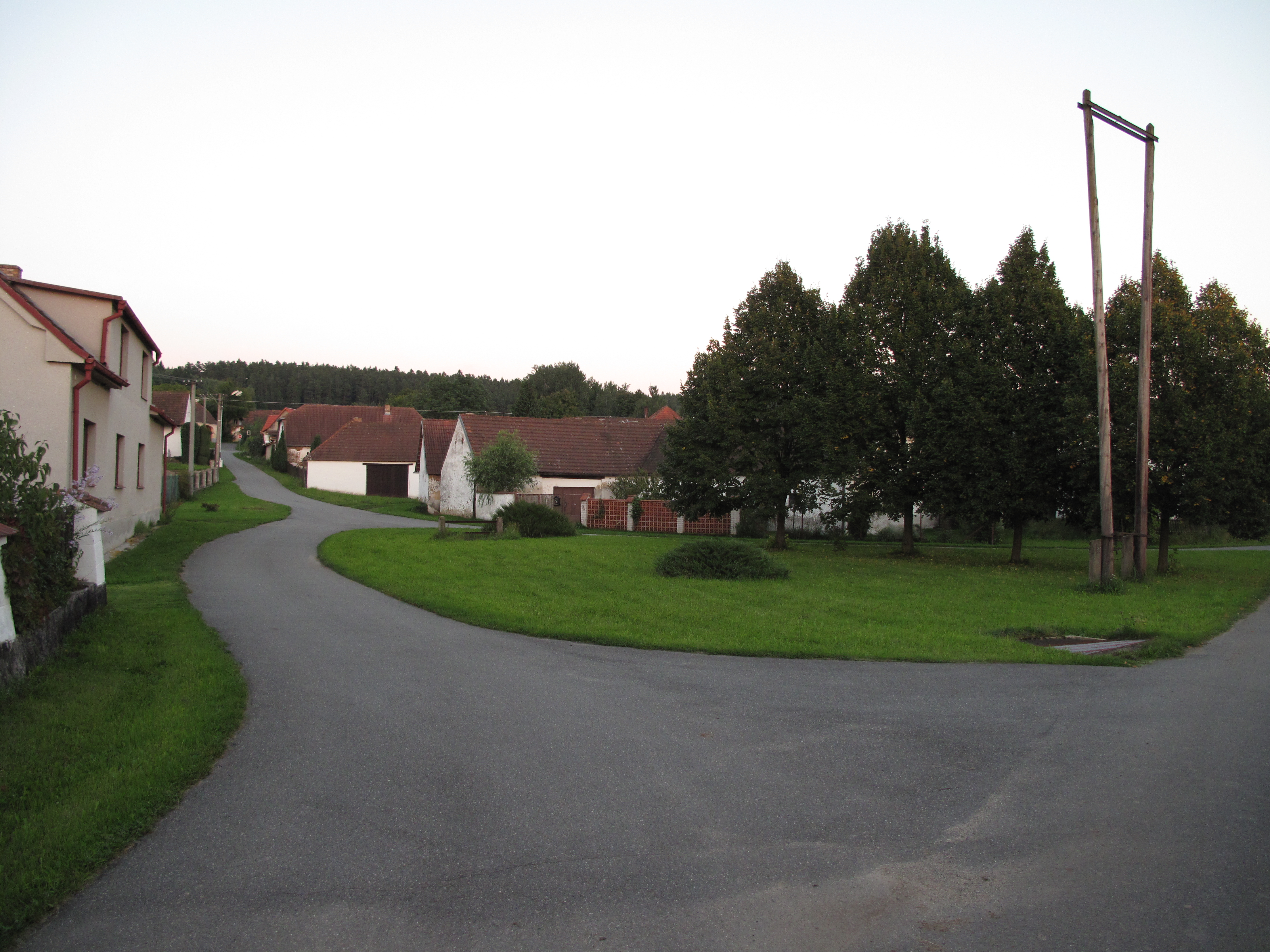 Náves se sušičkou na hadice v Doubravě. Okres České Budějovice, Česká republika.